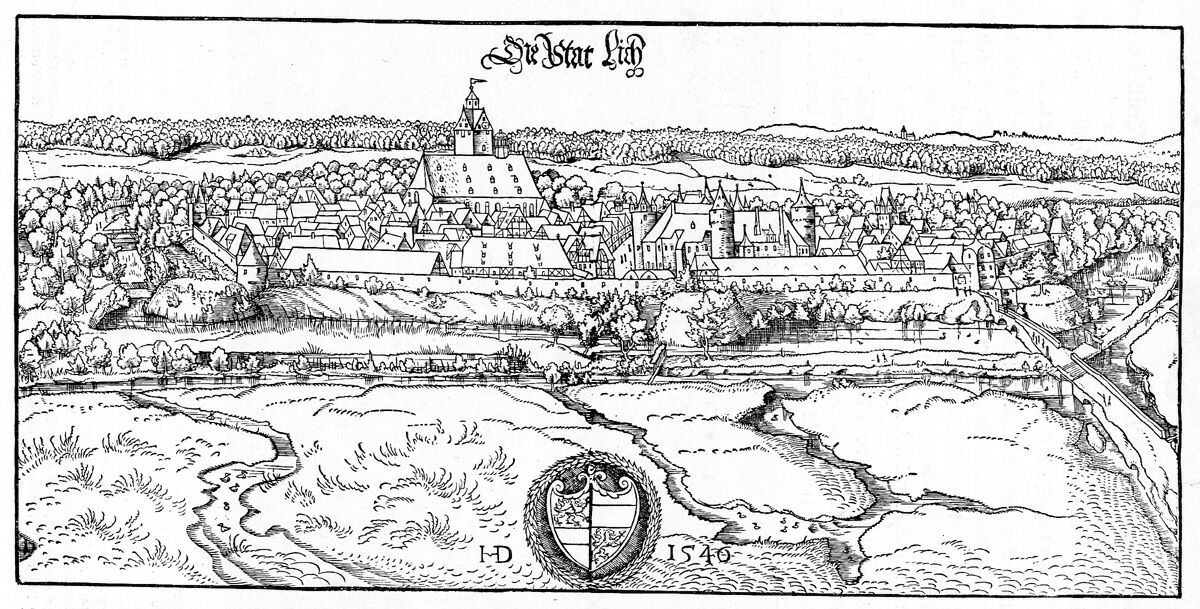 Holzschnitt von Hans Döring: Lich in Hessen, Deutschland